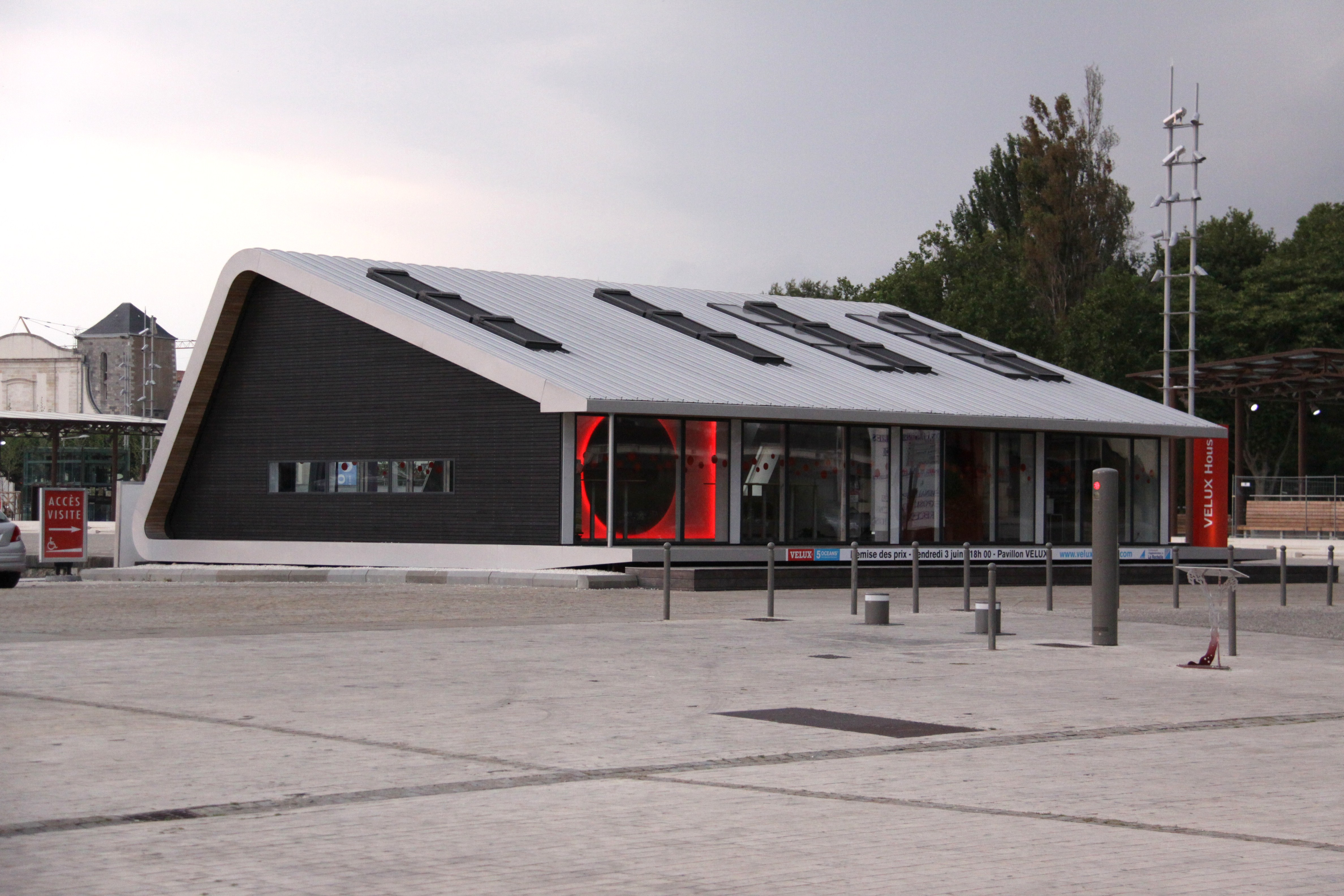 Le pavillon de la course autour du monde Velux 5 Oceans 2010 - 2011 (La Rochelle - La Rochelle) sur le Parvis Eric Tabarly. La Rochelle, Charente Maritime, France.